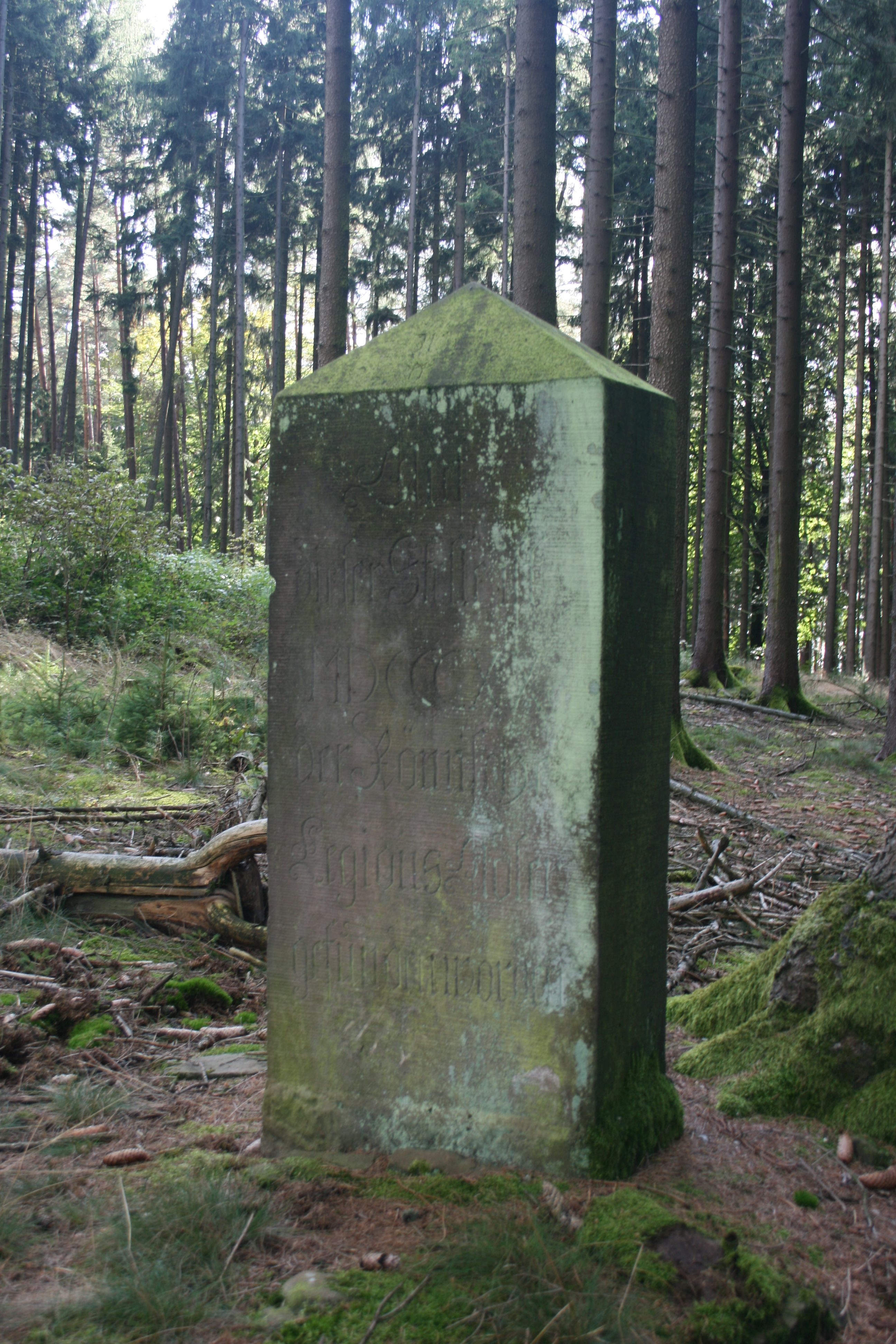 Adlerstein bei Würzberg. Text der Inschrift: Auf dieser Stelle ist MDCCCXX der Römische LegionsAdler gefunden worden